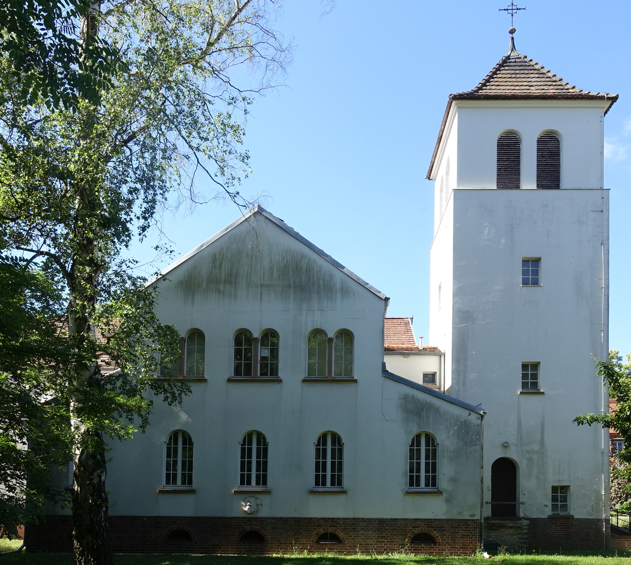 Die Giebelansicht der Klosterkirche